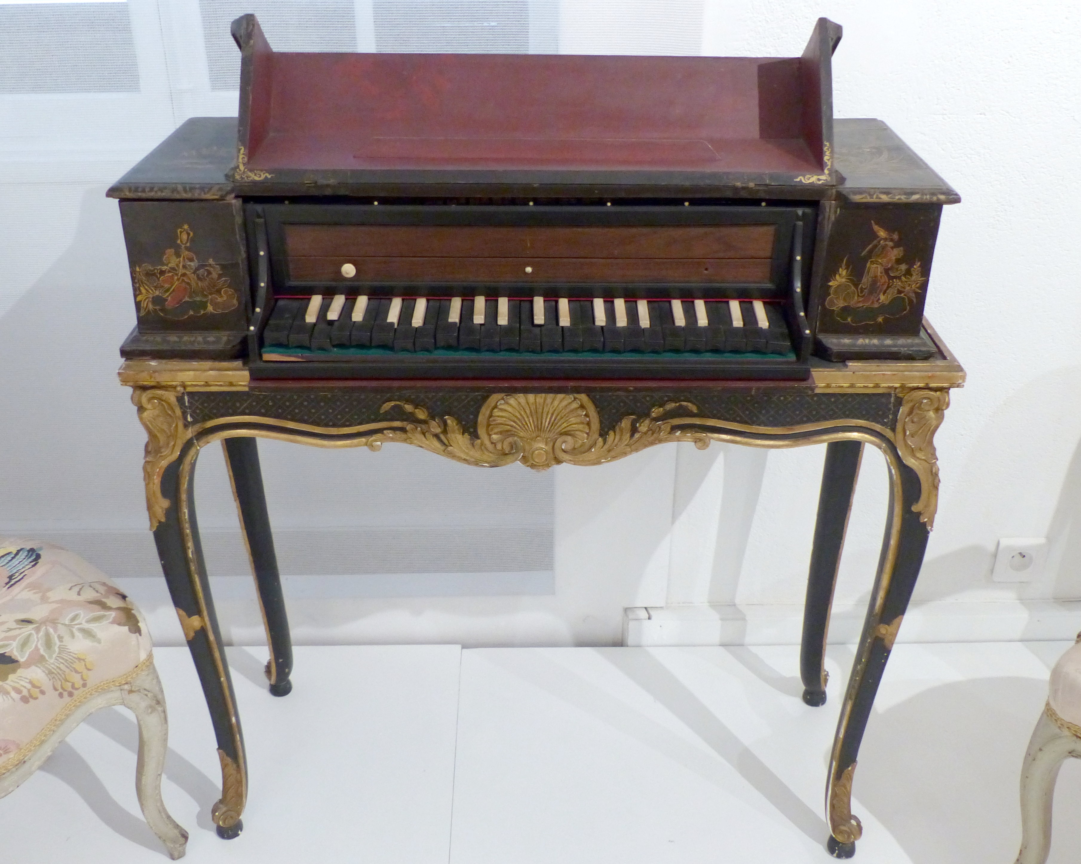 Nice (Alpes-Maritimes, France), au cœur du Vieux Nice, le palais Lascaris avec, entre autres, sa fabuleuse collection d'instruments de musique anciens, la deuxième de France.